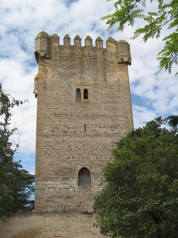 Castillo de Montemayor (Córdoba, España)